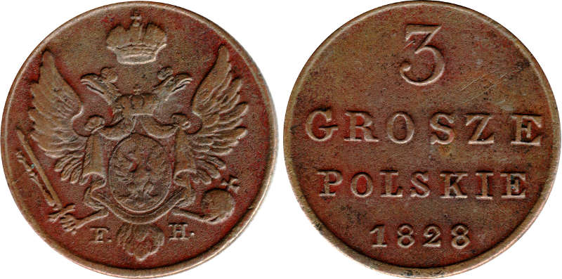 3 grosze polskie 1828